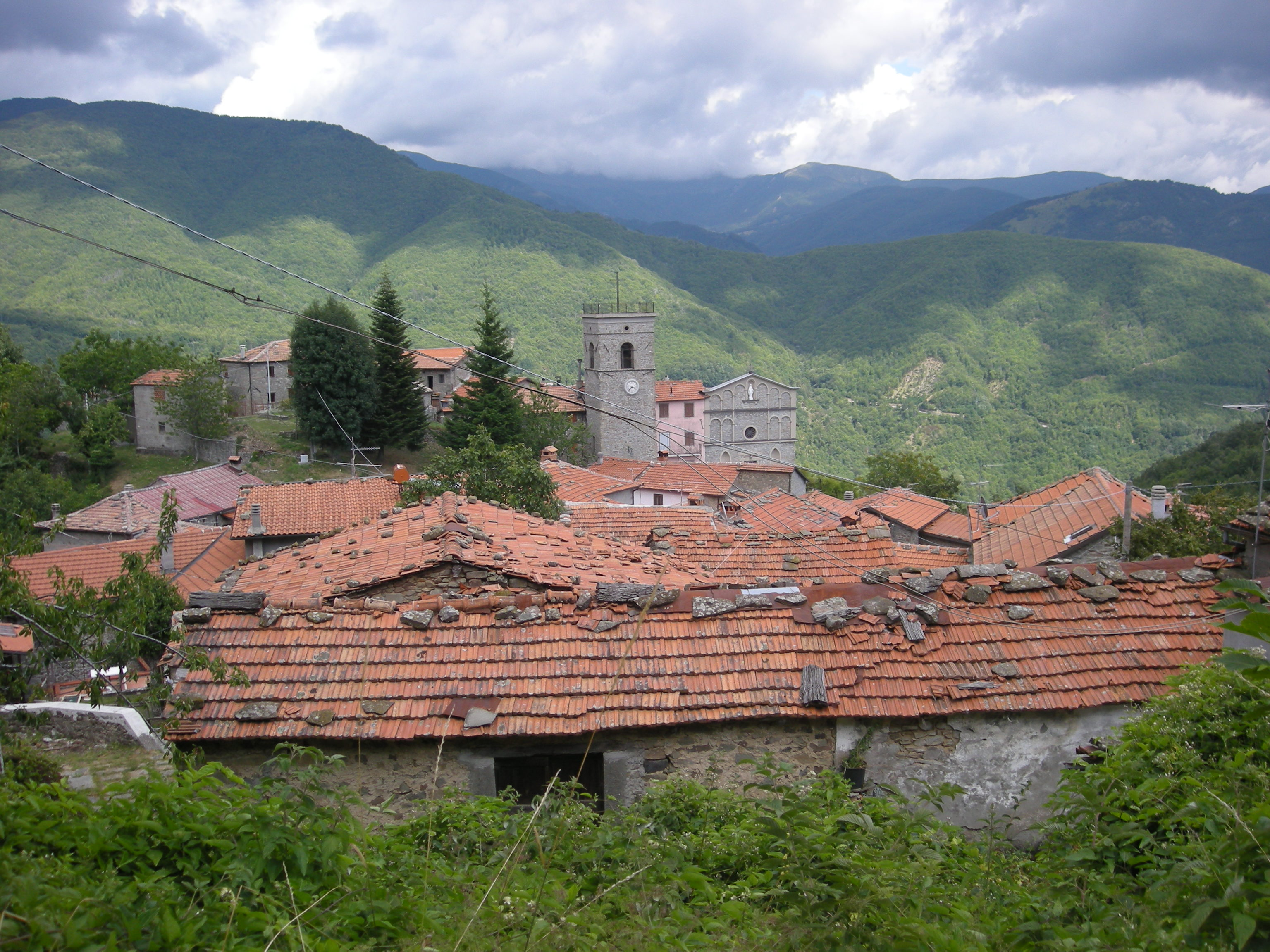 Dalli Sopra, fraz. di Sillano (LU - Garfagnana, Tuscany, Italy)